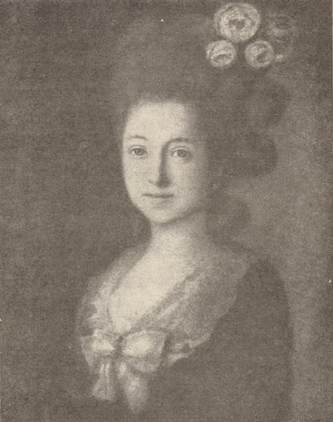 Мария Сергеевна Волчкова (1752—1805), дочь переводчика С. С. Волчкова, в первом браке за А. М. Салтыковым (1728—1775), во втором - за Пётром Богдановичем Пассеком (1736—1804).